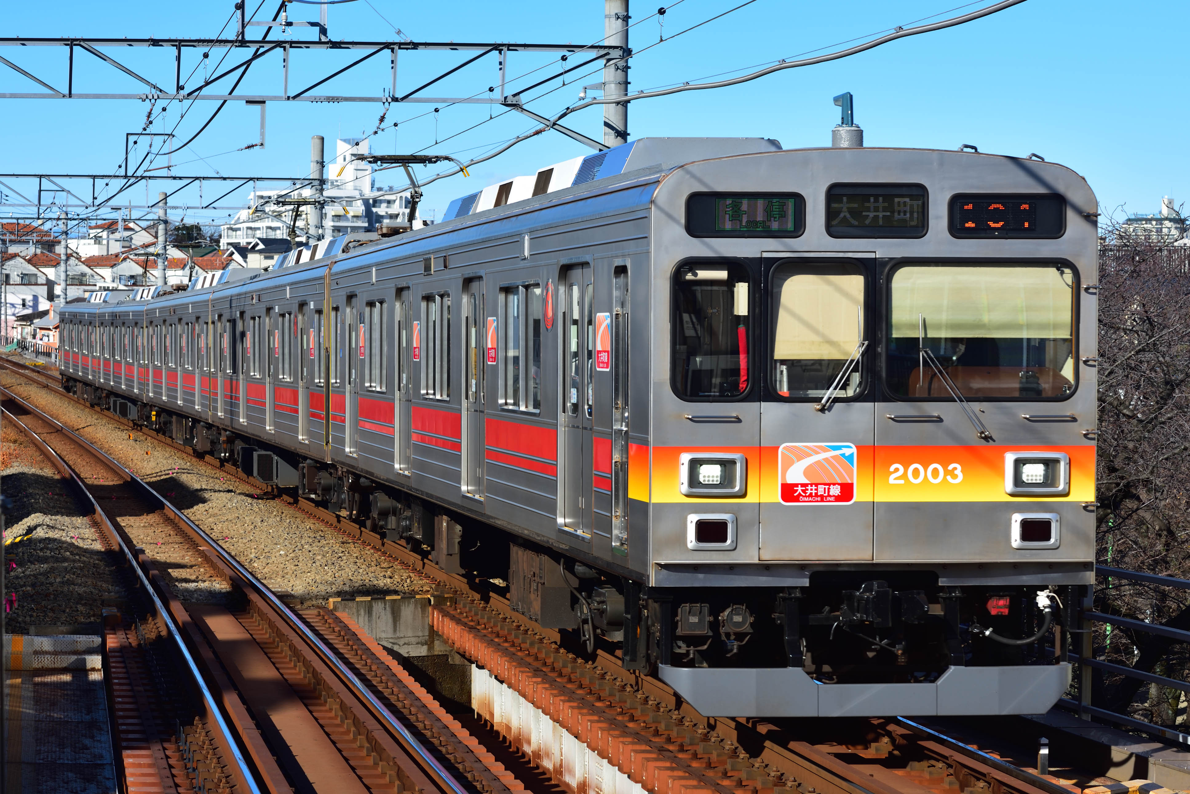 東急2000系（9020系）。大井町線 緑ヶ丘駅。 Nikon D750